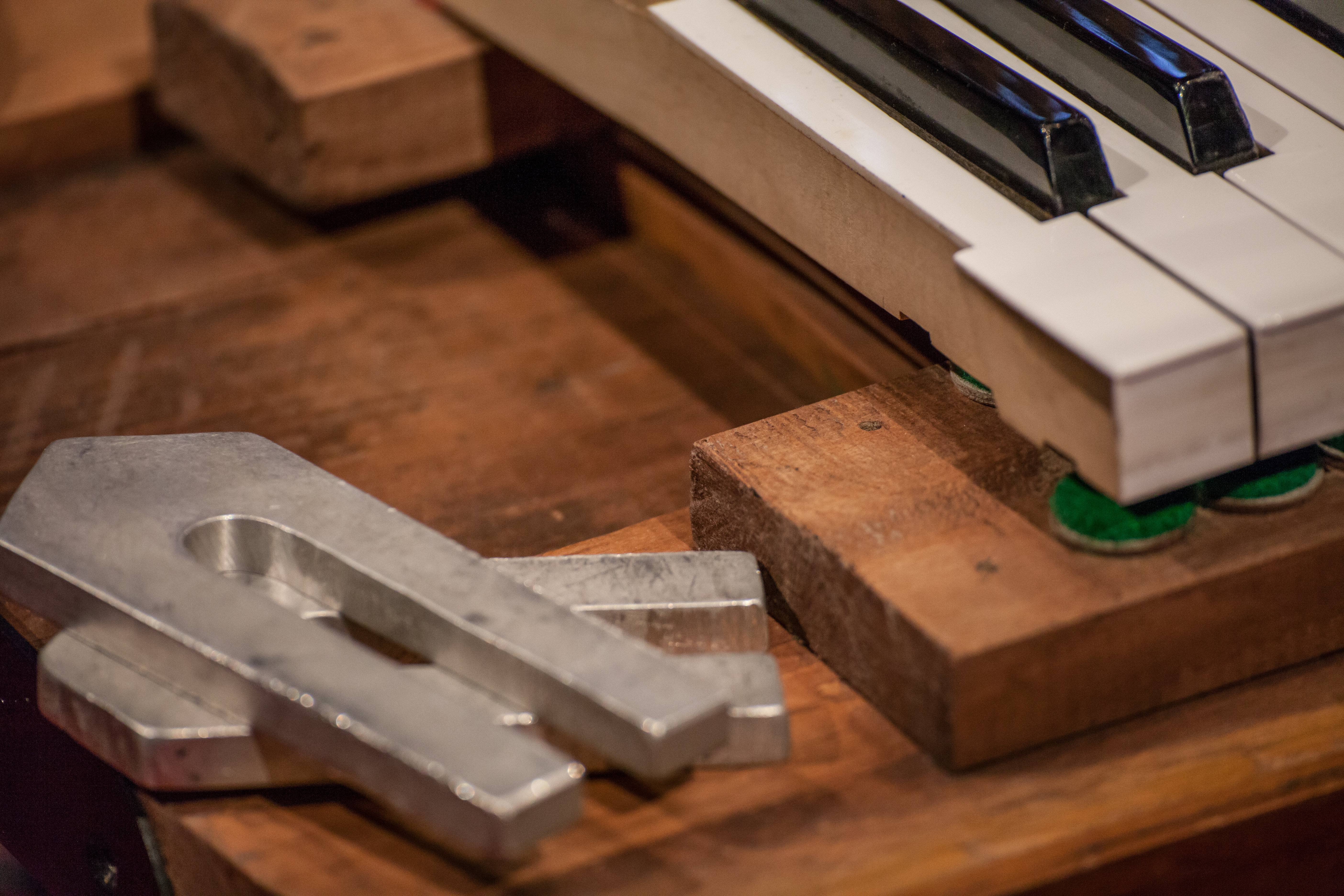 Detall dels diapasons i part del teclat del clavinimbus